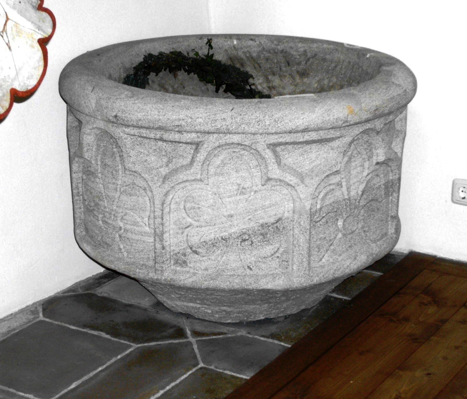 Trommetsheim, Gemeinde Alesheim im Landkreis Weißenburg-Gunzenhausen (Bayern), evang.-luth. Pfarrkirche St. Emmeram, gotischer Taufstein